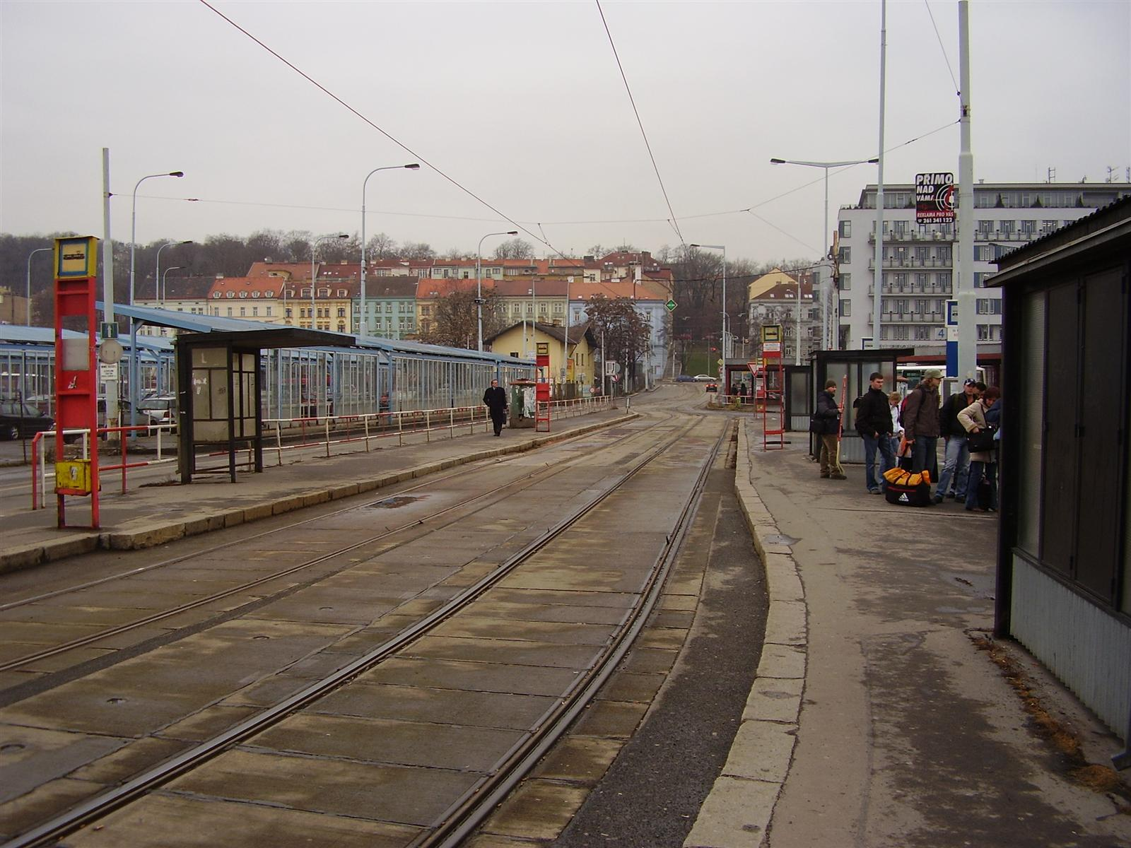 Tramvajová trať Na Knížecí v Praze